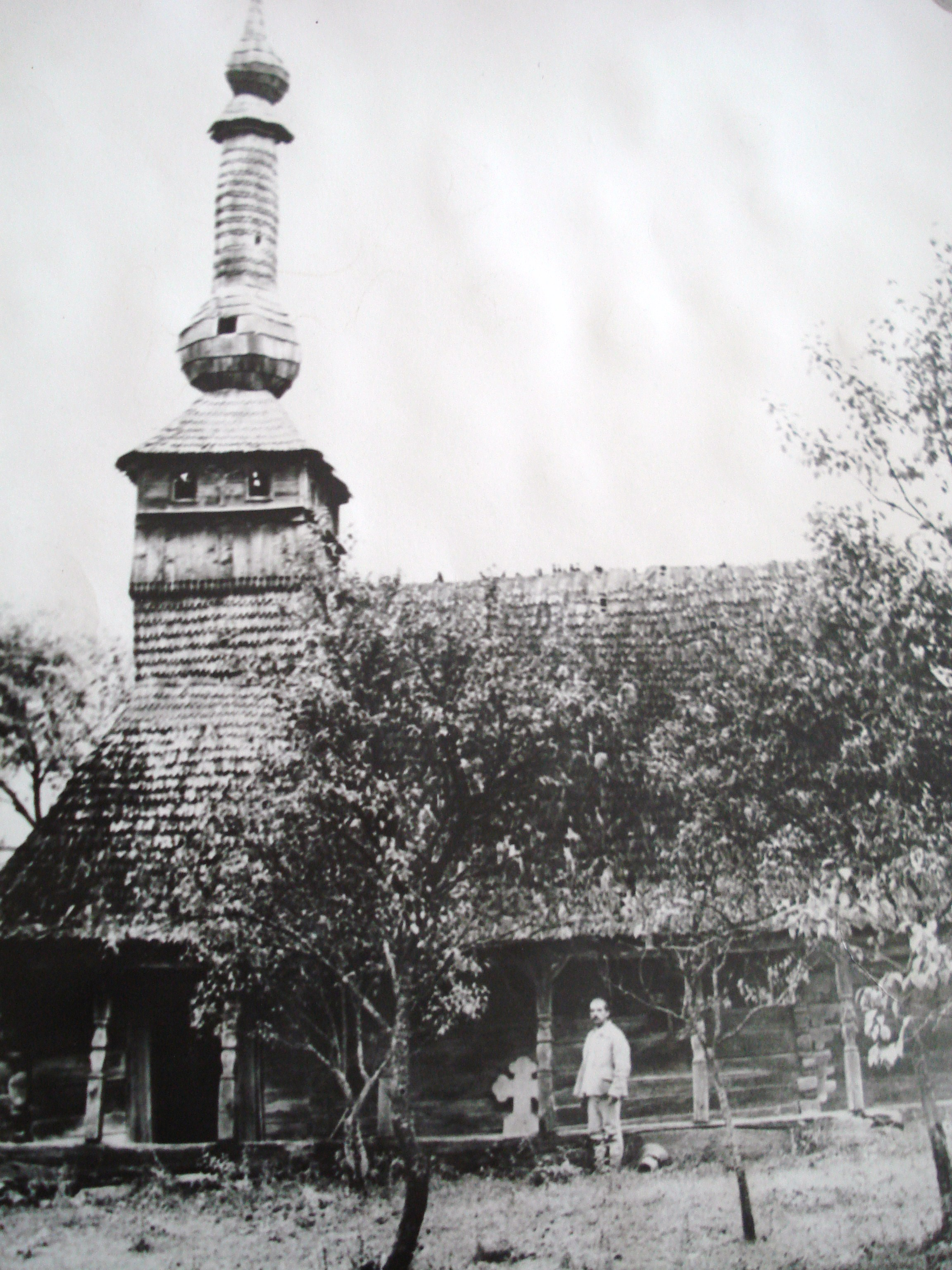 Biserica de lemn din Pâglișa (destroyed in 1926)